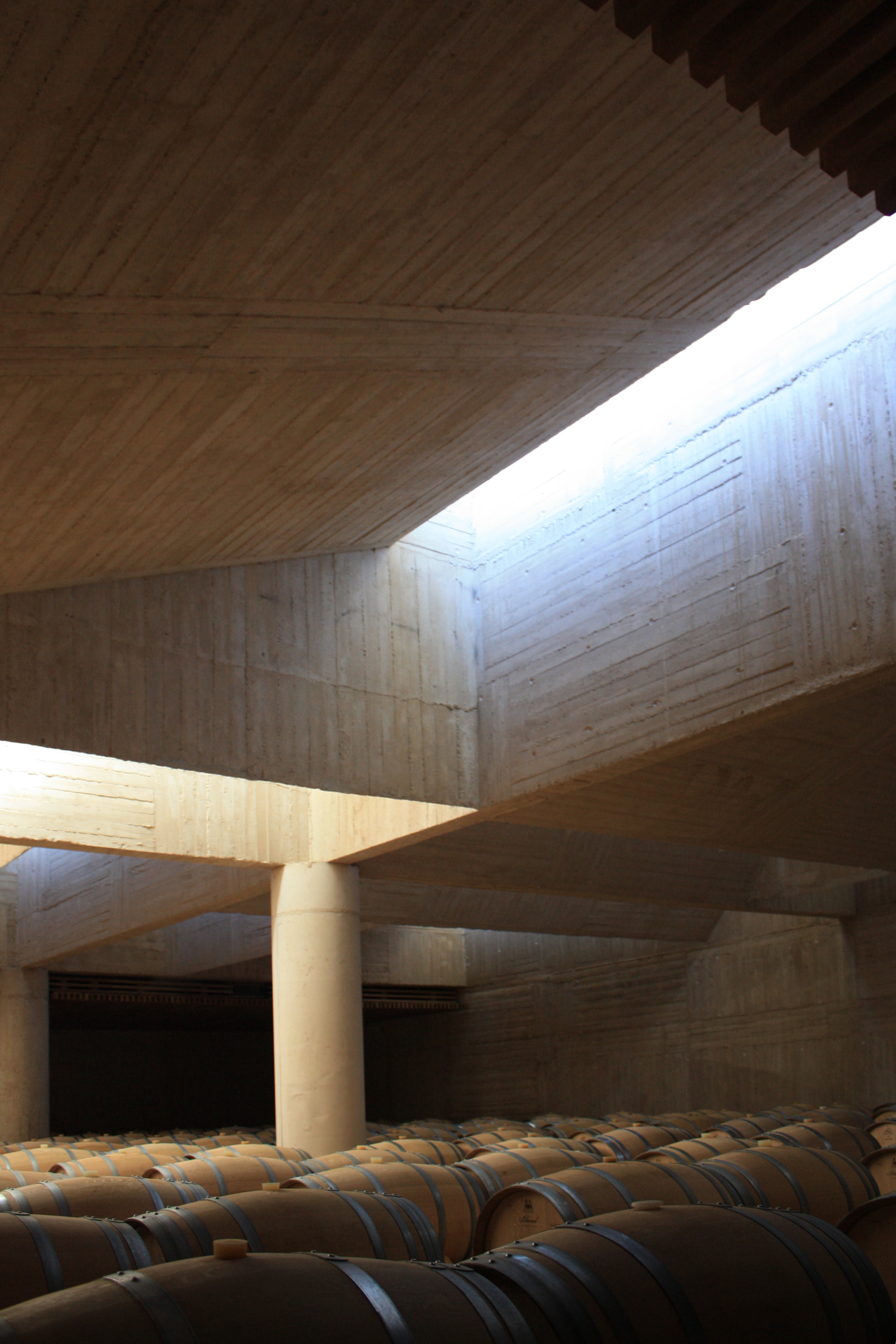 PagodeCarraovejas01